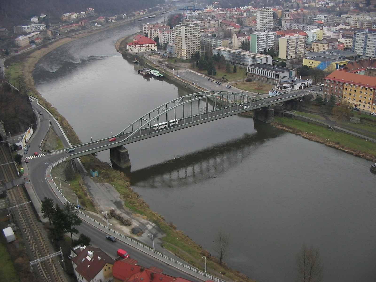 Łaba w czeskim Decinie